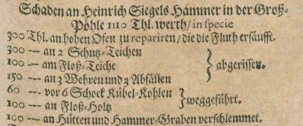 Heinrich Siegel (Hammerherr) war im 17. Jahrhundert Hammerherr, also Besitzer, der Hammerwerke Siegelhof (Hammerwerk) in Groß-Pöhla, Rittersgrün und Unterblauenthal. Beim großen Hochwasser Anfang August 1661 entstand an Siegels Hammerwerk in Großpöhla ein Schaden von 1110 Talern, davon allein 300 Taler, um den Hohen Ofen zu reparieren, der in den Fluten versunken war, weitere 300 Taler an zwei Schutzteichen, 100 Taler am Floßteich, 150 Taler an drei Wehren und drei Wassergefällen, die weggerissen worden waren. 6 Schock gelagerte Kübel mit Kohlen für 60 Taler und Floßholz im Wert von 100 Talern wurden weggespült. Weitere 100 Taler musste Heinrich Siegel für die Beseitigung des Schlammes in den Hüttengebäuden und im Hammergraben aufwenden. Darüber berichtete Christian Lehmann in seinem Historischer Schauplatz derer natürlichen Merckwürdigkeiten in dem Meißnischen Ober-Ertzgebirge, Leipzig 1699, Seite 275 [1] Digitalisat der ULB Halle, abgerufen am 8. Juli 2014